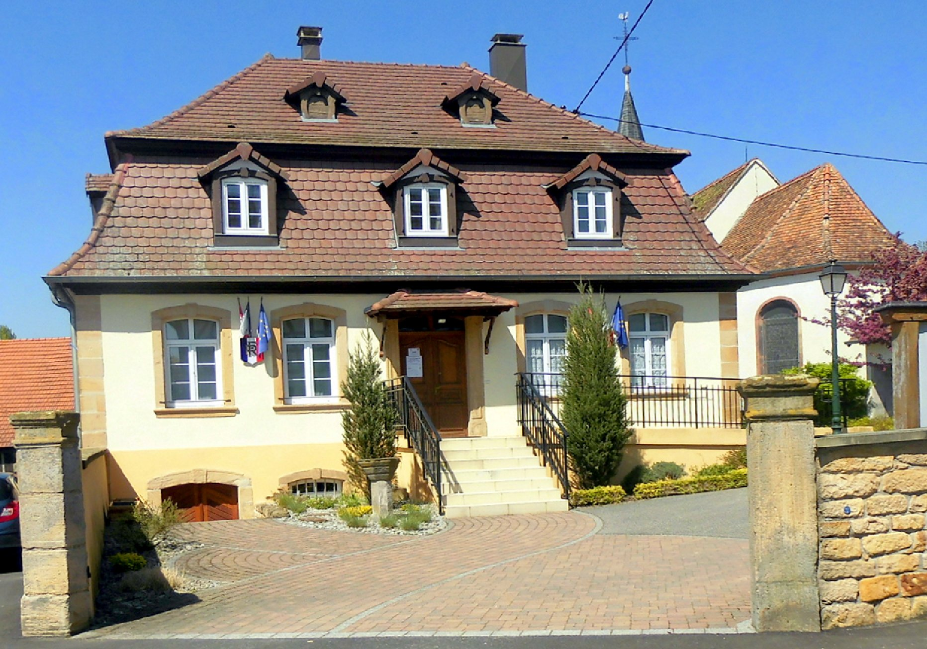 La mairie de Keffenach